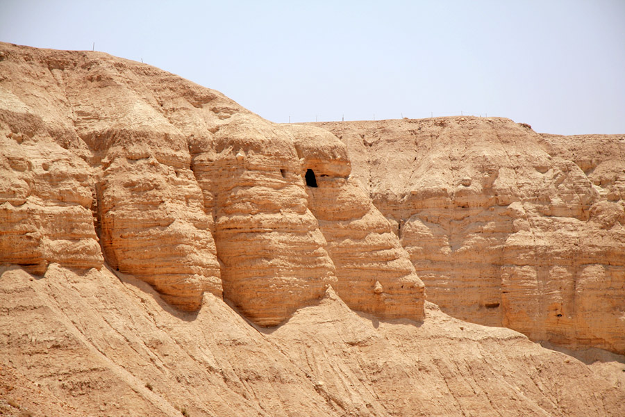 Qumeran's caves